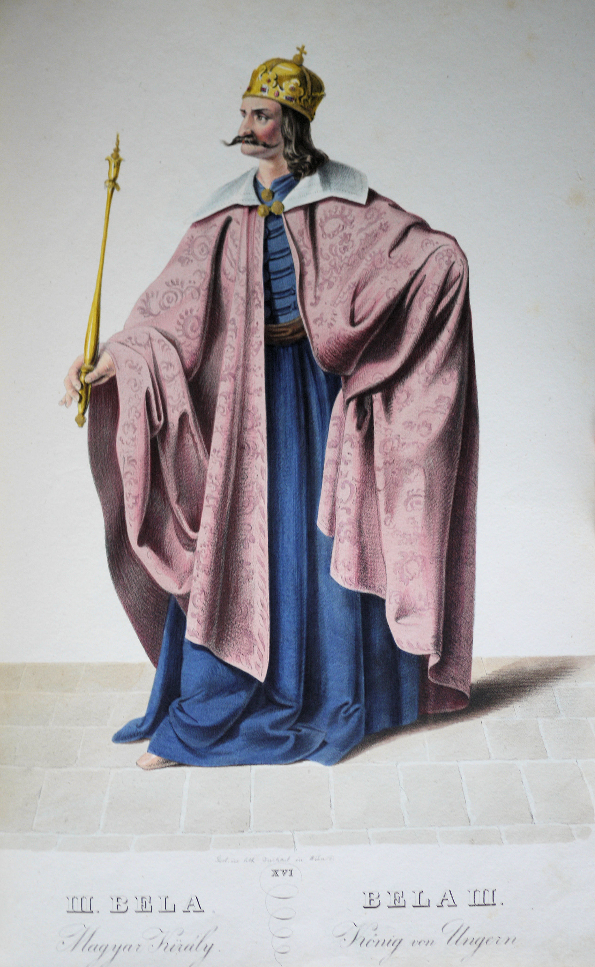 B´la III. (1148-1192) König von Ungarn etc. Lithographie von Josef Kriehuber nach einer Zeichnung von Moritz von Schwind aus Ungerns Erste Heerführer Herzoge und Koenige In einer Reihe von Bildnissen von Bela bis auf Seine Majestät Franz I. Kaiser Von Österreich König Von Ungern &c., &c. Wien : Lithographisches Institut ;ca. 1828